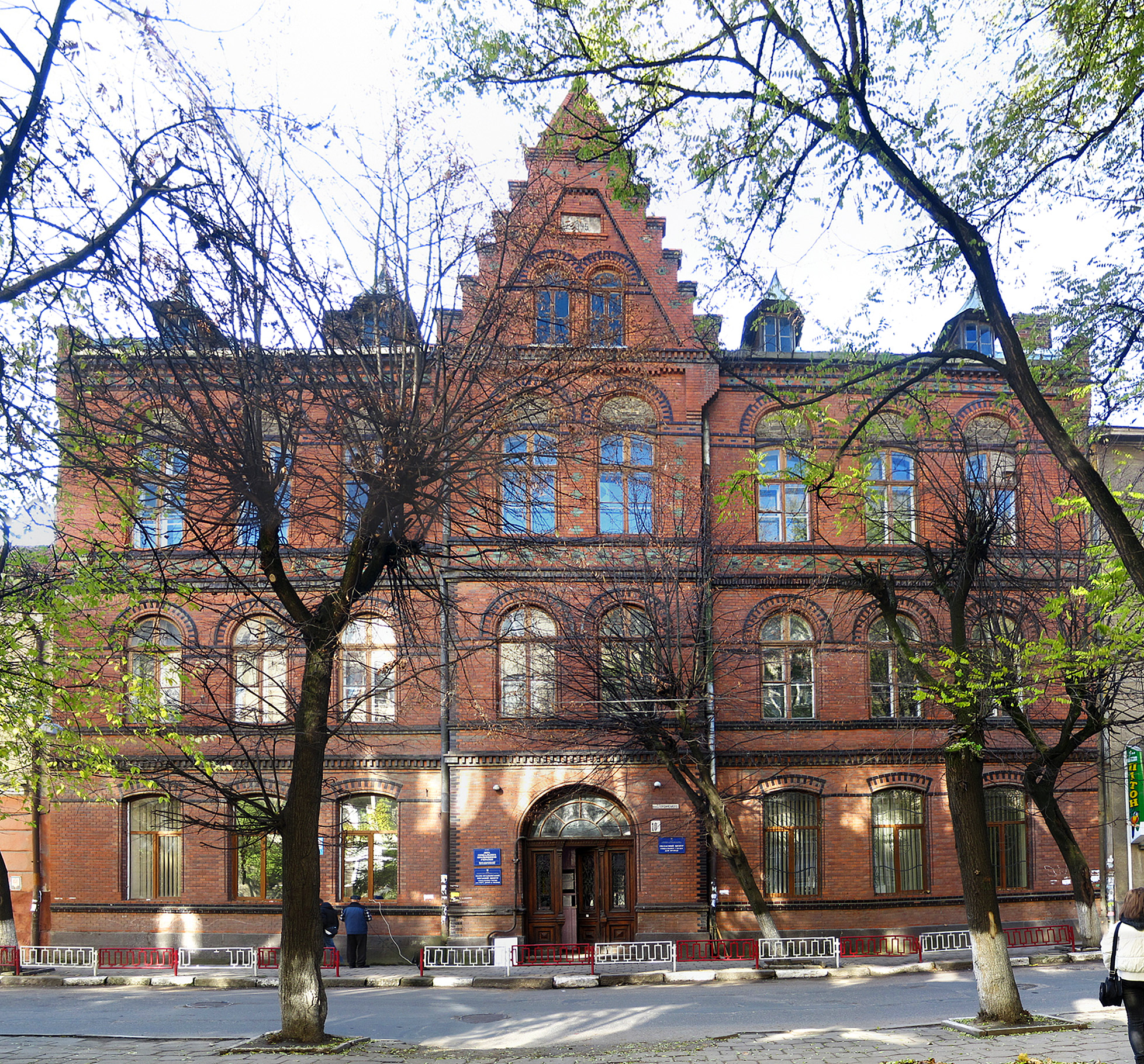 Вул. С. Гординського, 10